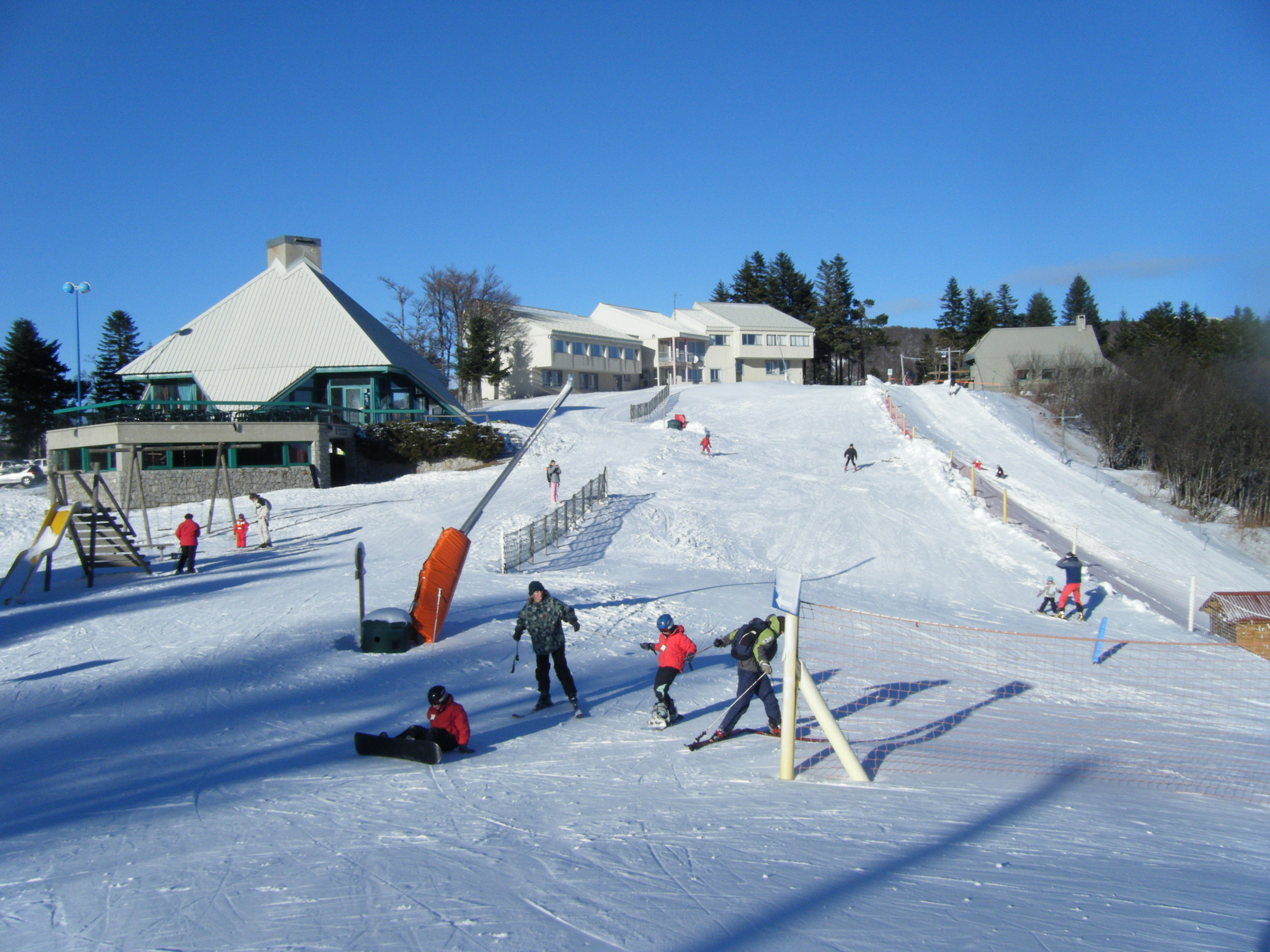 une piste verte pour les débutants à la station de ski de La Croix de Bauzon.